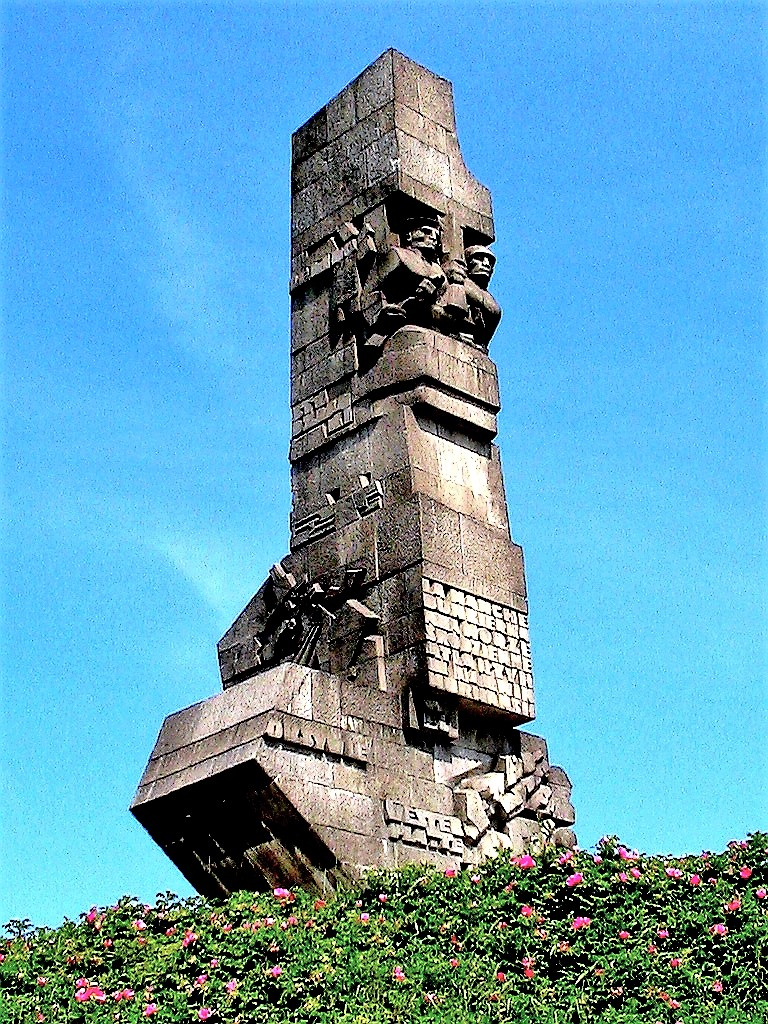 Monument Westerplatte, Gdansk, Poland